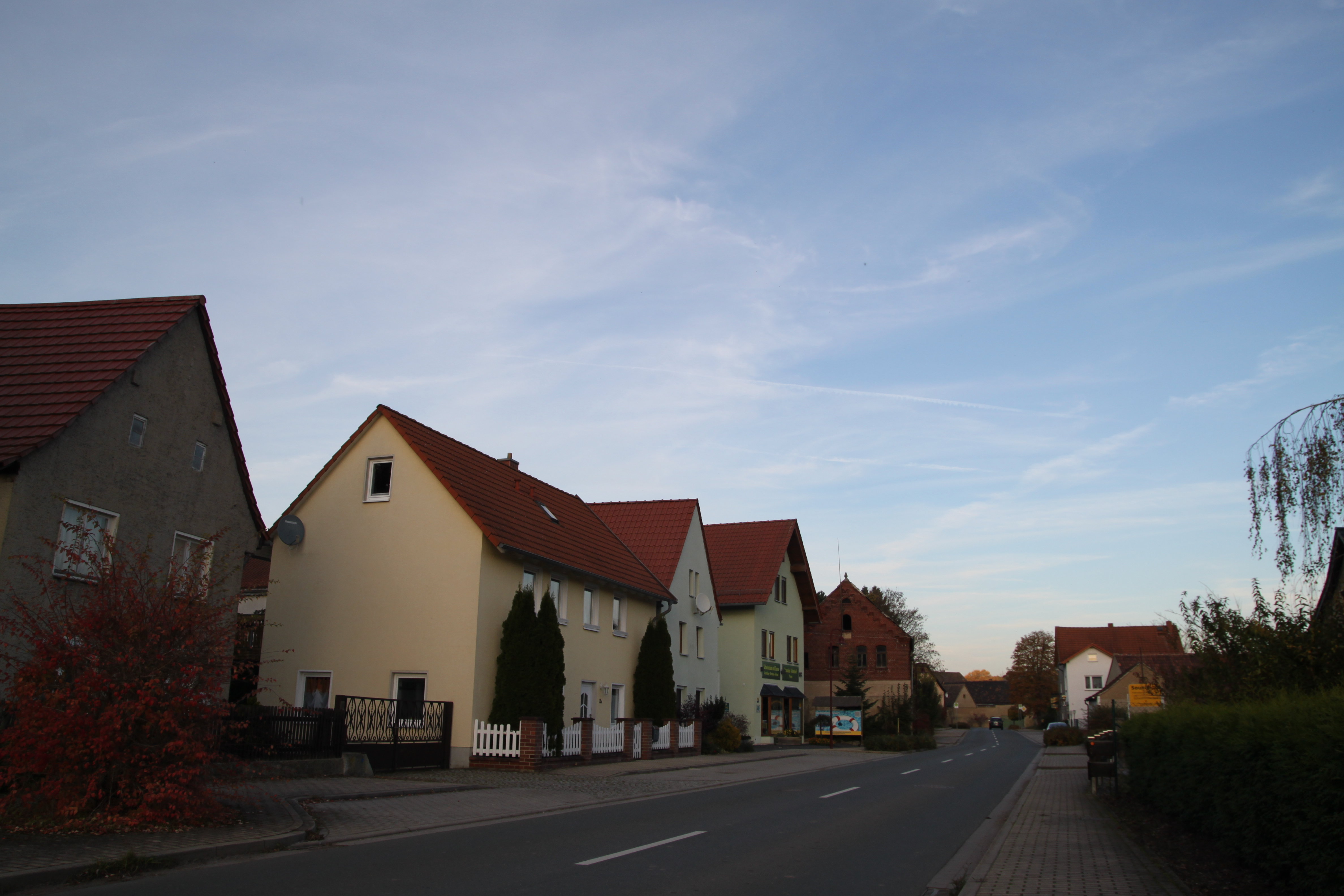 Ahlendorf, Dorfstraße